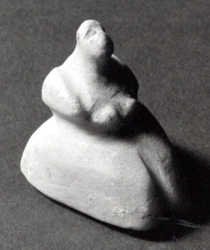 Sculpture; Stone-Sculpture